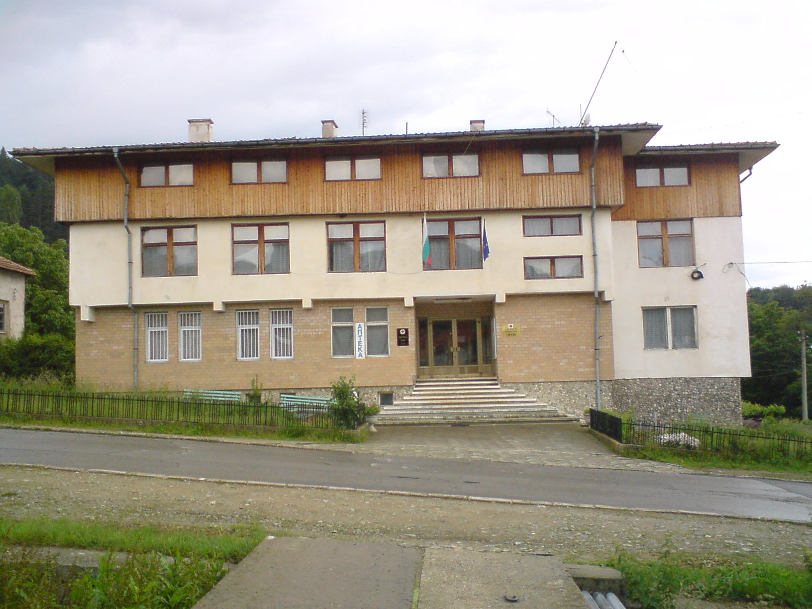 Кметството на с. Дрен (Област Перник)